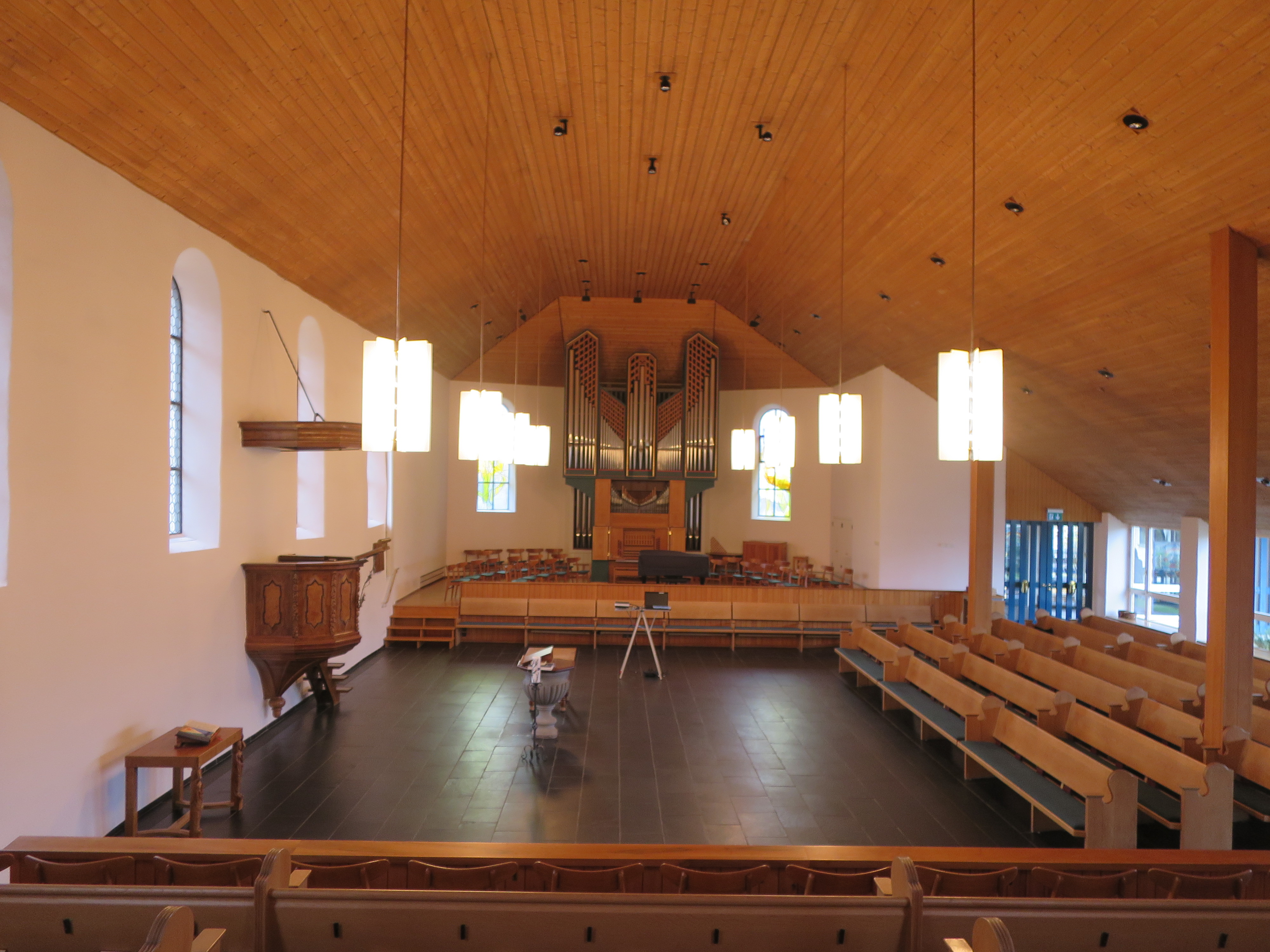 Ref. Kirche Rüschlikon - Blick nach Norden